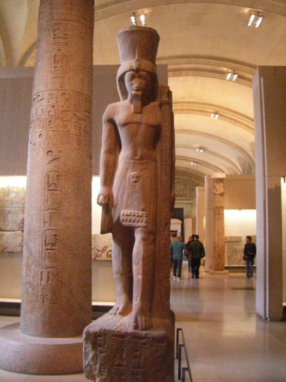 Statue colossale de Séthi II provenant de Karnak. louvre.fr